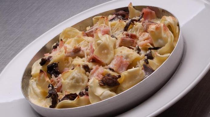 Los Capelettis a la Caruso, son una receta que tiene más de 50 años. La misma fue creada por Montecatini Ristorante en el año 1967. Los Capelettis son de carne y espinaca, hechos a mano. Mientras que la salsa, cuenta con crema, hongos de pino, jamón cocido, pollo y un ingrediente secreto.